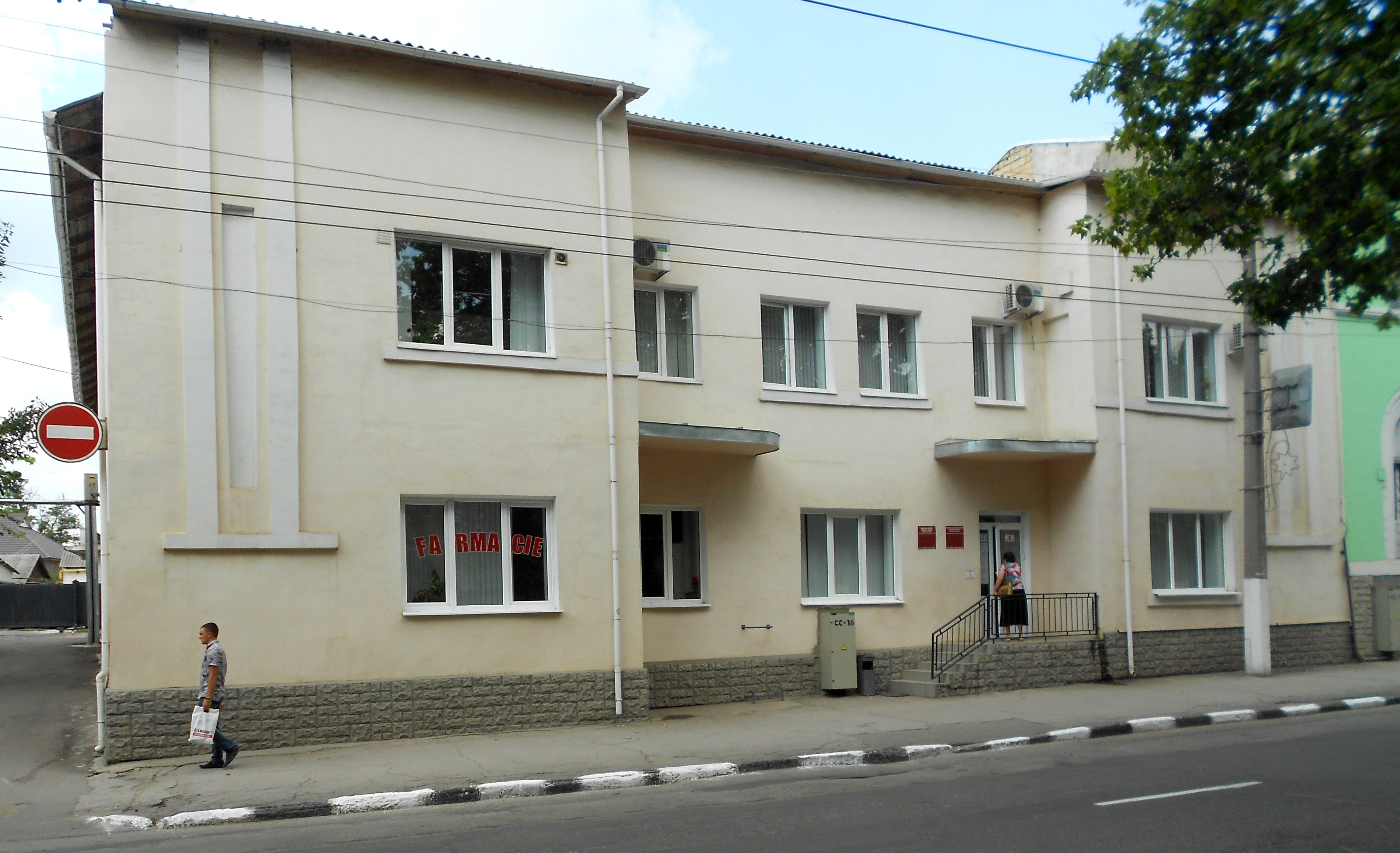 Centrul de sănătate nr. 2 din Bălți